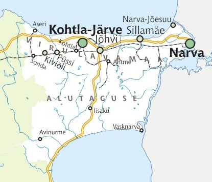 Ida-Viru maakonna kaart